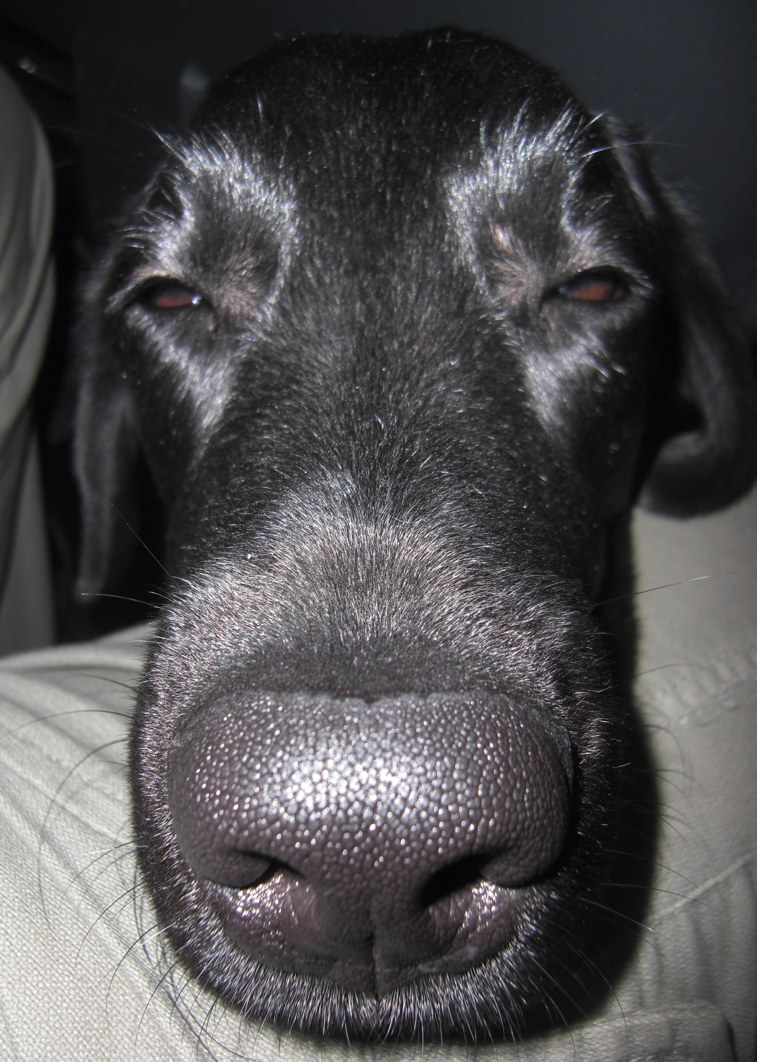 Nosen och morrhåren på en svart tik av rasen Labrador Retriver. Notera att skärpan ligger på hundens morrhår. Hunden heter Zally och bor i Västra Frölunda, Västergötland, Västra Götalands län, Sverige. Zally är här fotograferad i baksätet på en minibuss där hon tagit tillflykt till fotografens knä efter att fått bannor av sin husse när hon ställt till med bus.